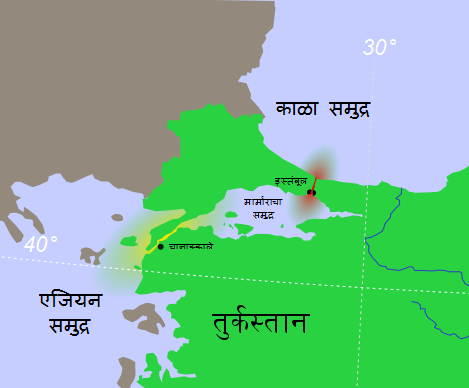 तुर्कस्तानमधील बोस्फोरस व डार्डेनेल्झ ह्या सामुद्रधुन्या